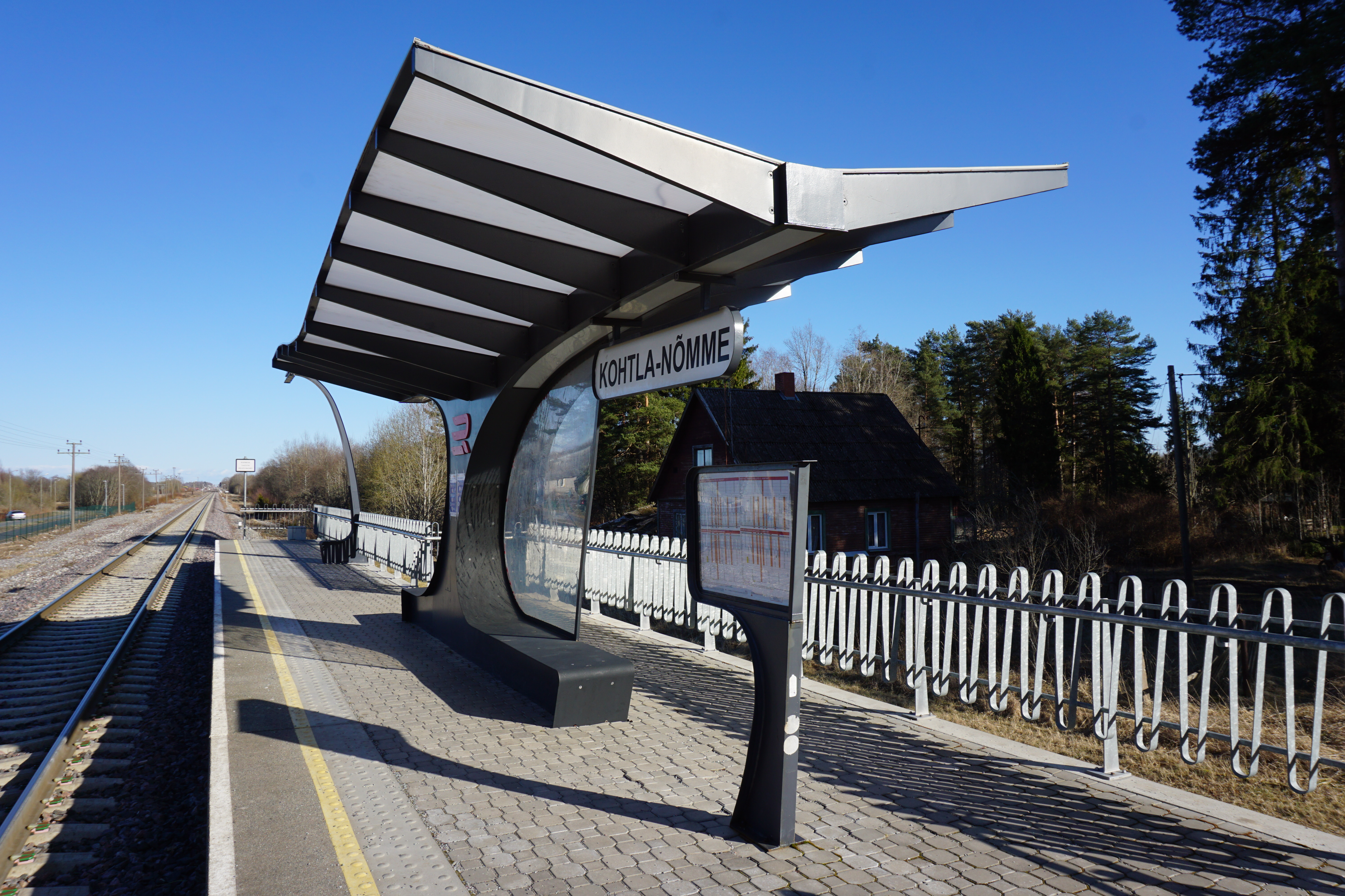 16. detsembril 2014 avatud Kohtla-Nõmme raudteepeatus.